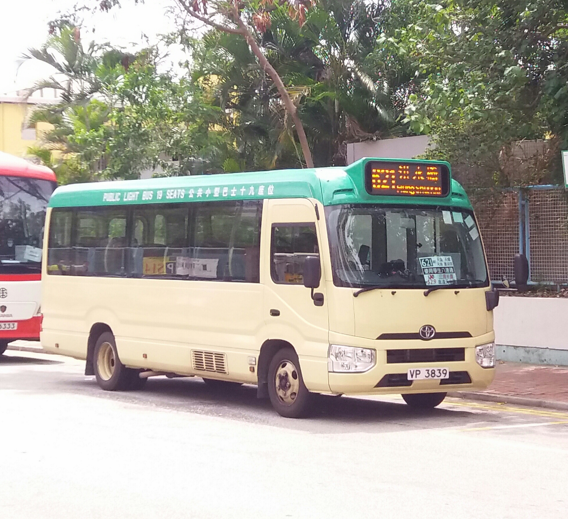 中文（香港）: 新界區專線小巴621線，正在天水圍醫院準備開出